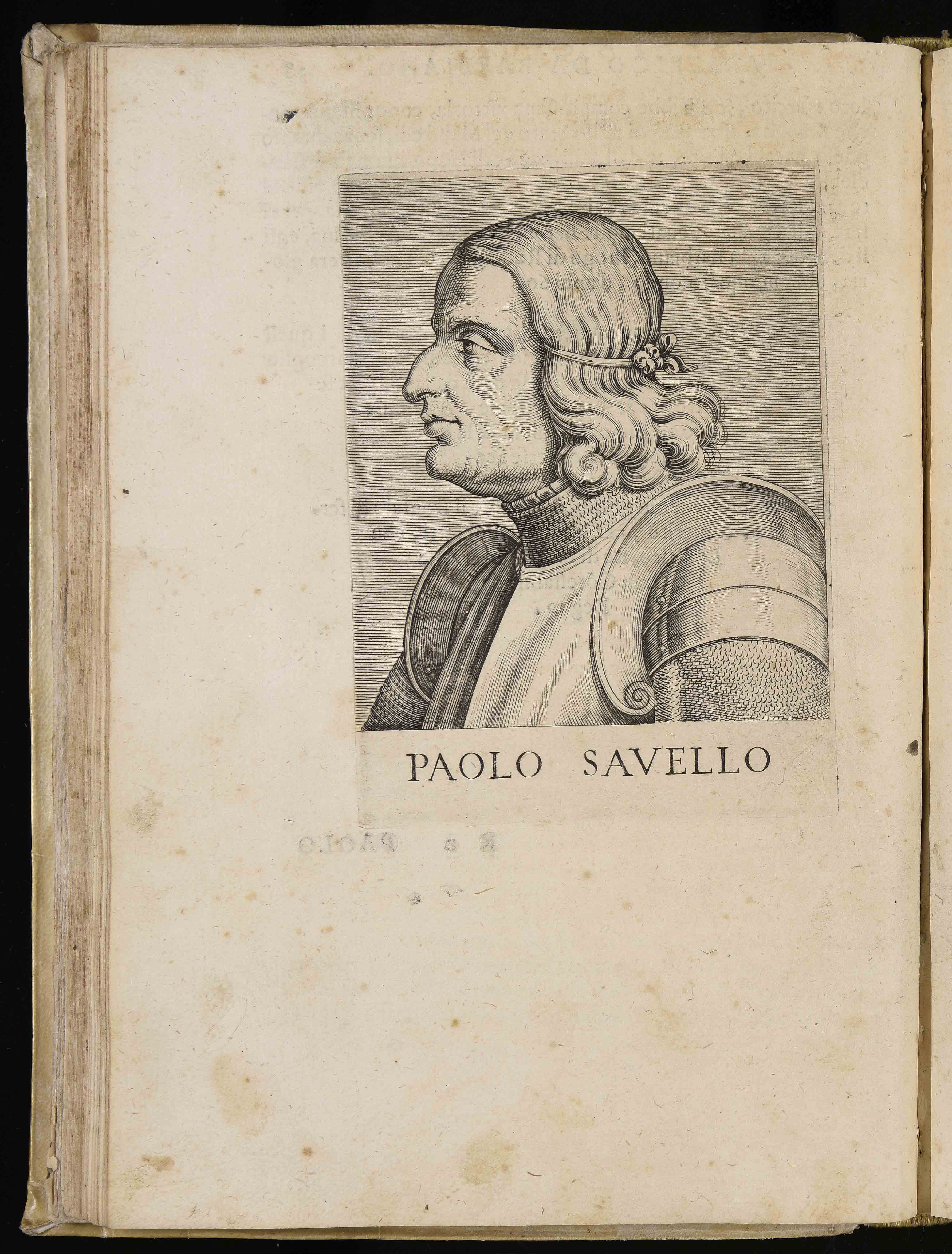 Calcografia in Aliprando Caprioli, Philippe Thomassin & Jean Turpin, in Aliprando Caprioli, Philippe Thomassin & Jean Turpin, Ritratti di cento capitani illustri con li lor fatti in guerra, Roma, Domenico Gigliotti/Philippe Thomassin & Jean Turpin, 1596/1600.